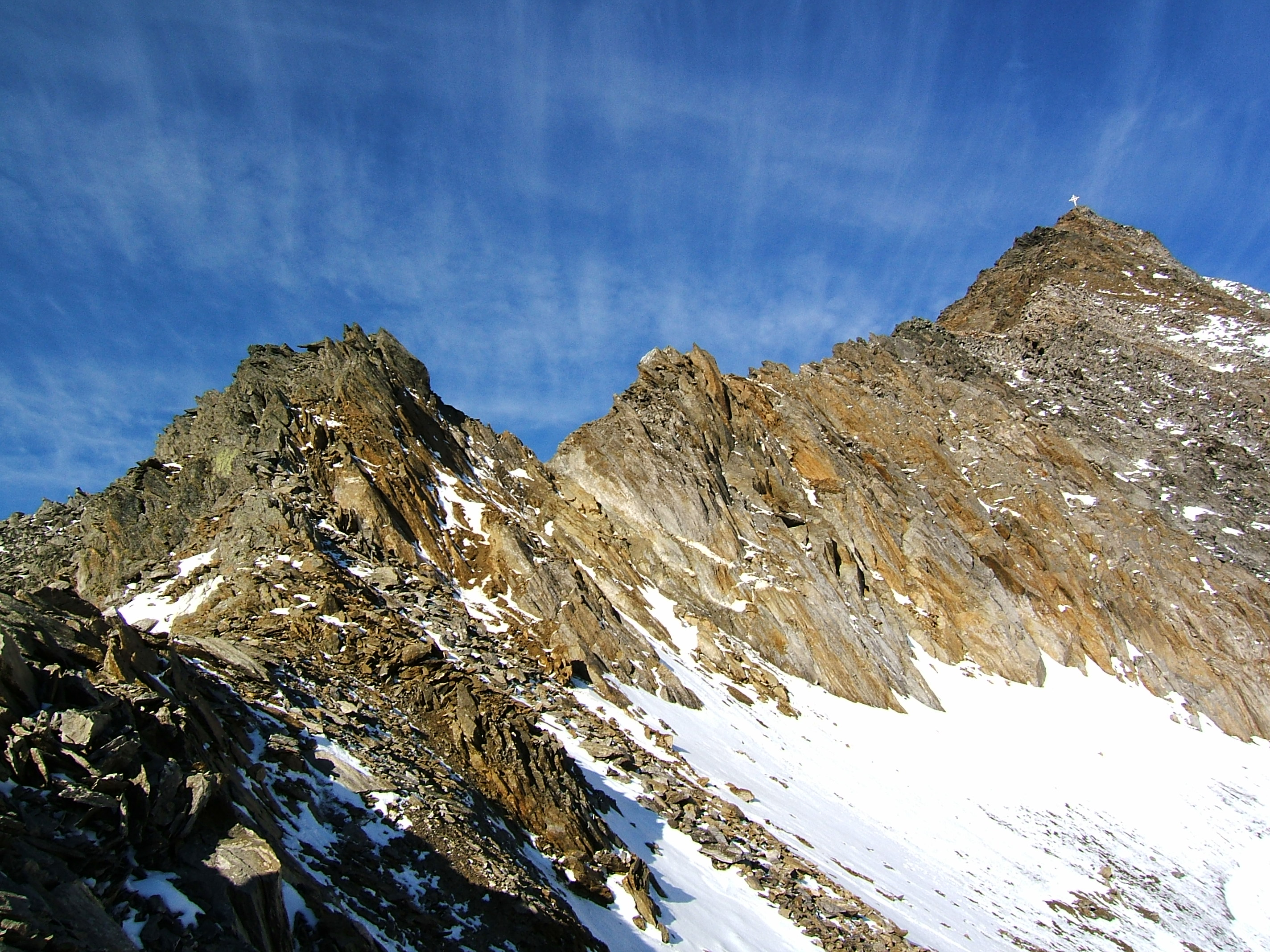 Gipfelaufbau des hintereren Seelenkogels von Osten